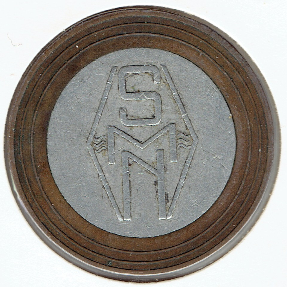 Boordgeld Stoomvaart Maatschappij Nederland. 500 cent aluminium, vierkant - achterzijde